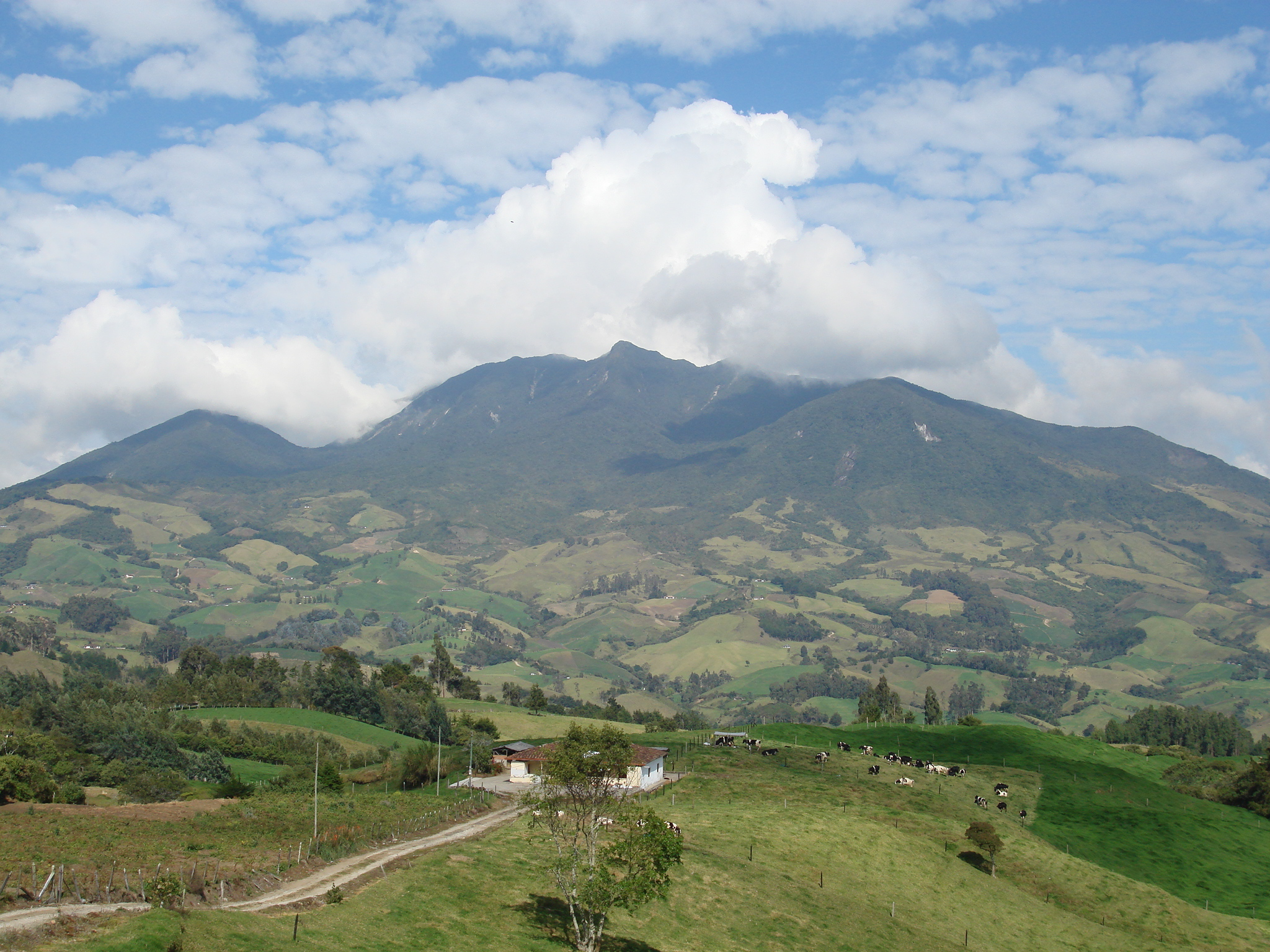 Paramo de Sonsón, Cordillera central